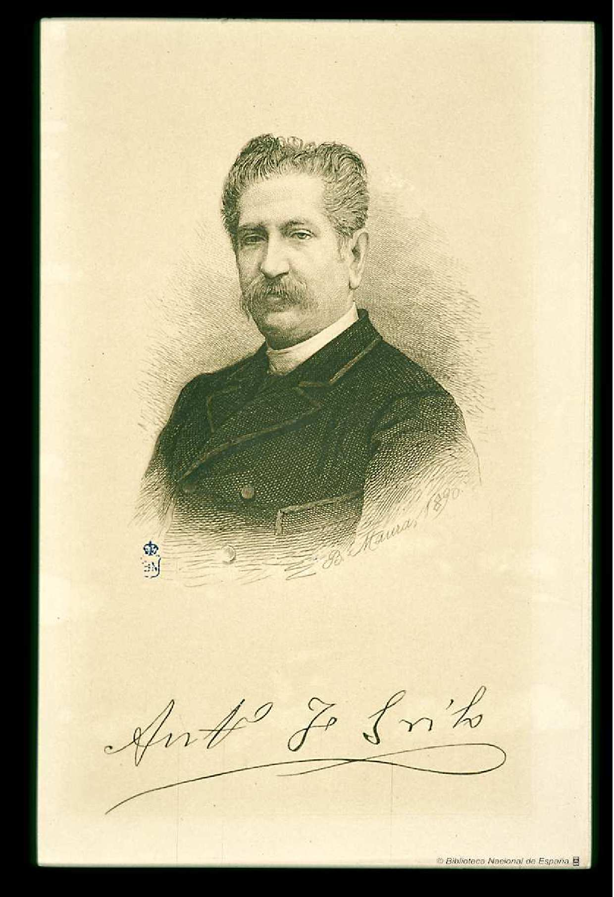 Retrato de Antonio Fernández Grilo por Bartolomé Maura y Montaner, aguafuerte, Madrid, Biblioteca Nacional de España. Autógrafo: Antº F. Grilo